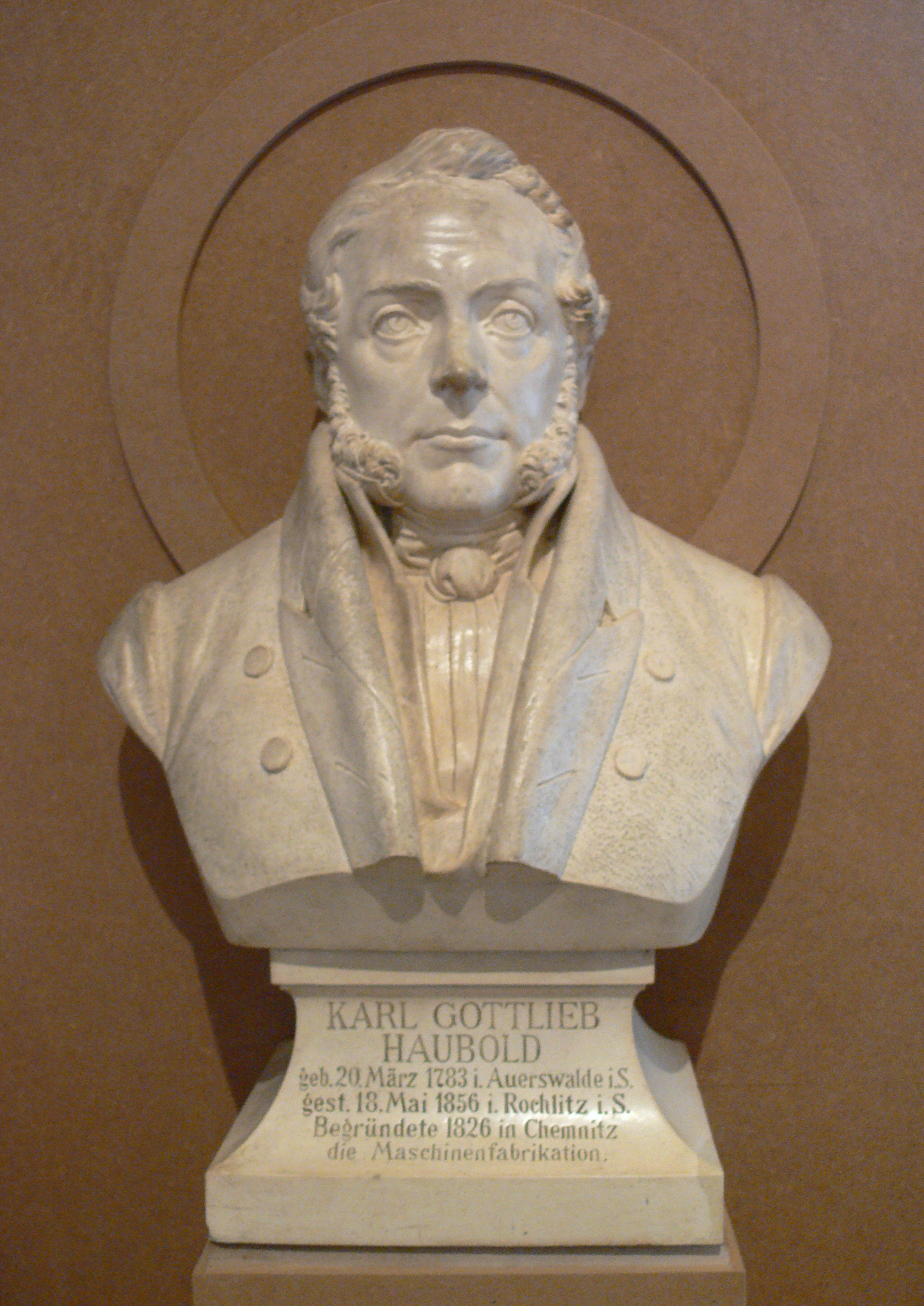 Büste Karl Gottlieb Haubold (1783–1856), Begründer der Maschinenfabrikation in Chemnitz Schloßbergmuseum Chemnitz